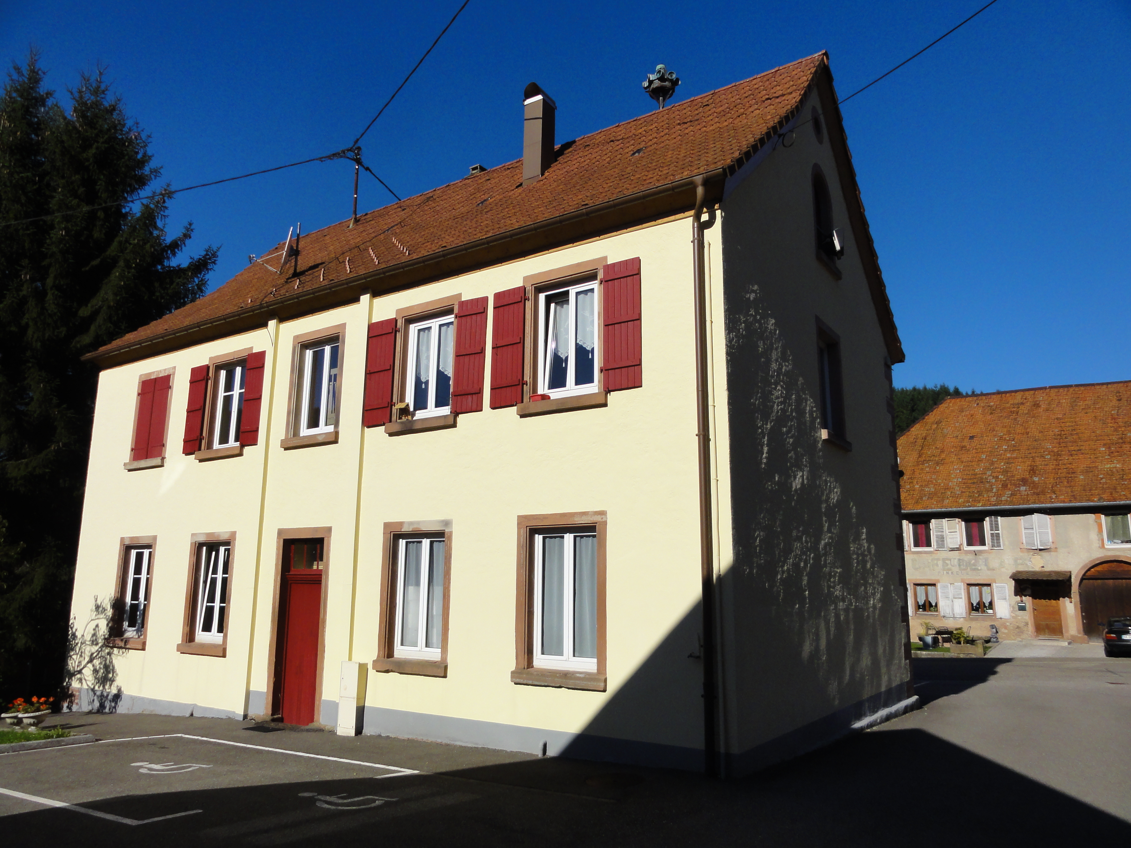 Alsace, Bas-Rhin, Fouday, Mairie-école (1839), 45 rue Principale. .